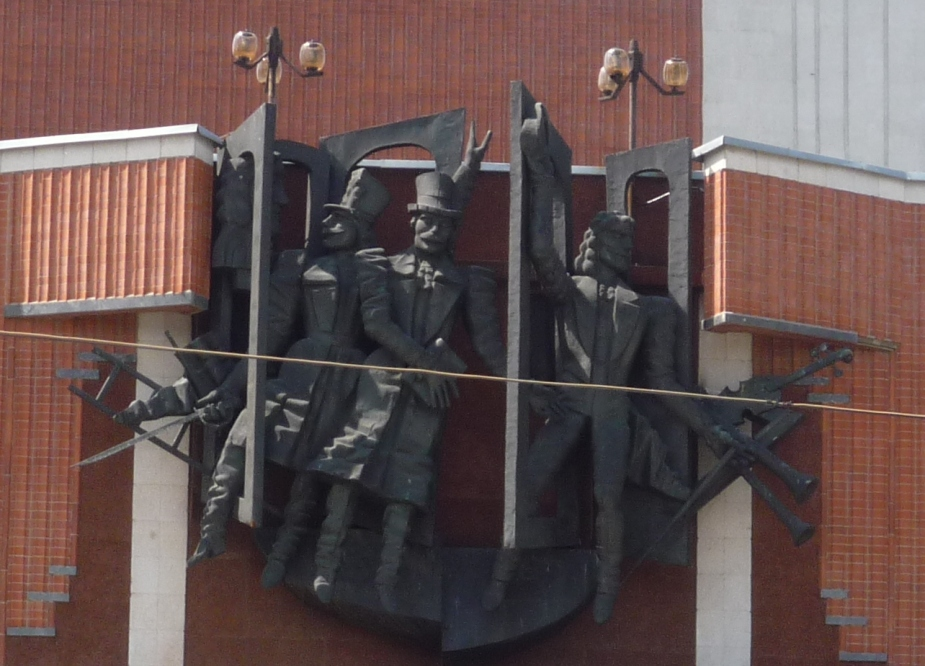 Compoziția sculpturală „Teatru”, autor Iurie Hvorovski, de pe frontispiciul clădirii Teatrului Național din Bălți.